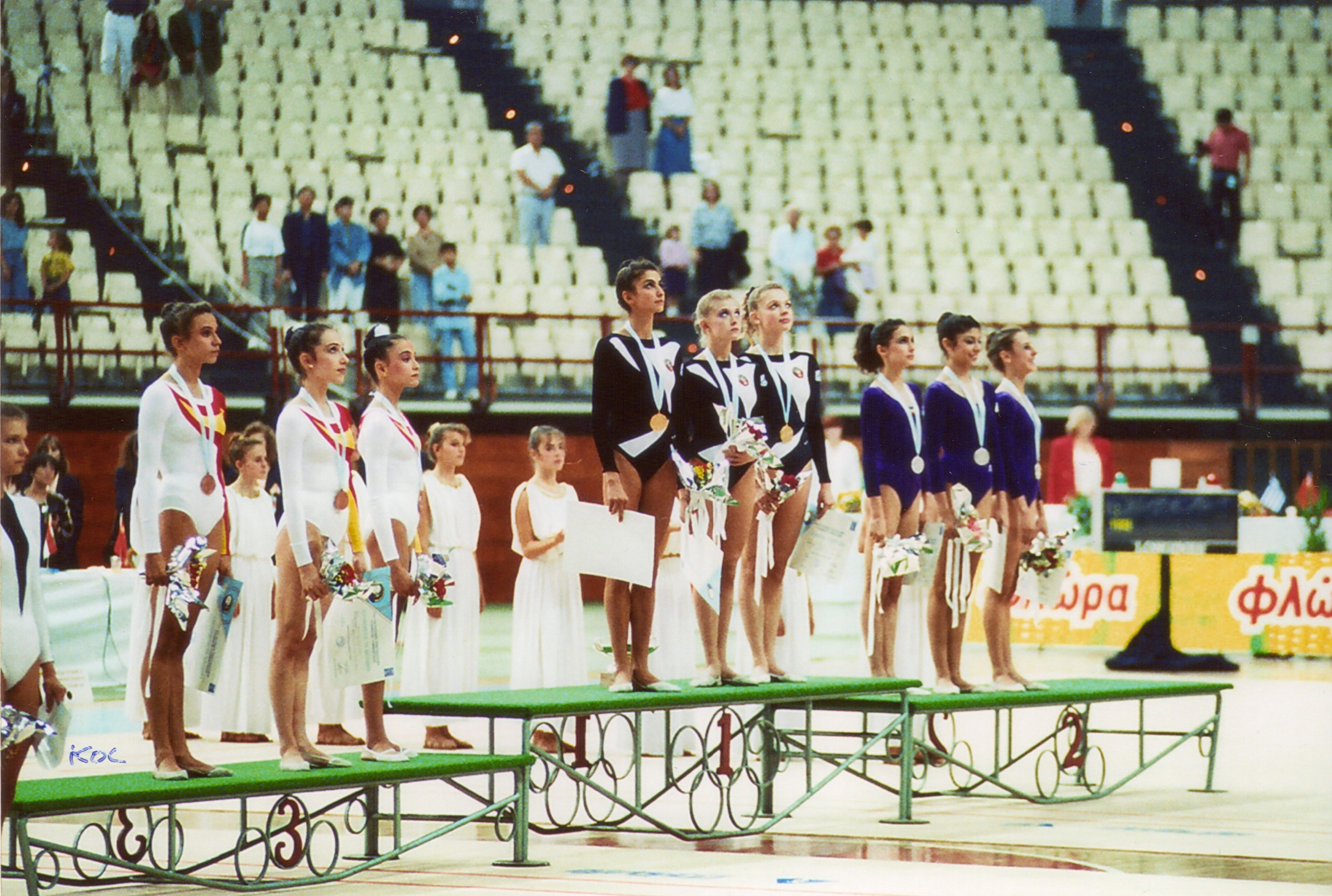 Podio por equipos en el Campeonato Mundial de Gimnasia Rítmica de Atenas en 1991. De izquierda a derecha: Carmen Acedo, Mónica Ferrández y Carolina Pascual (España); Alexandra Timochenko, Oksana Kostina y Oksana Skaldina (URSS); Maria Petrova, Kristina Shikerova y Mila Marinova (Bulgaria).